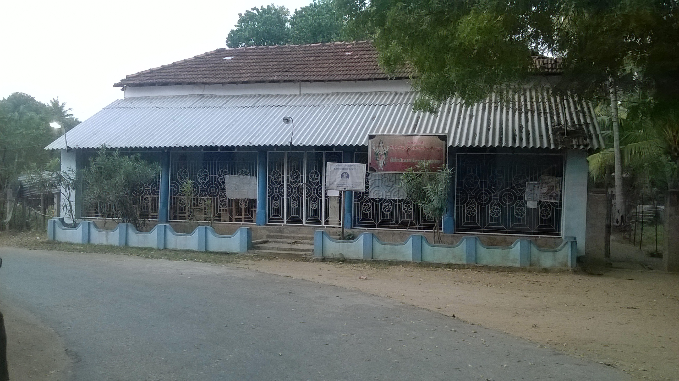 அறநெறி பாடசாலை ஆரம்ப கால தோற்றம்